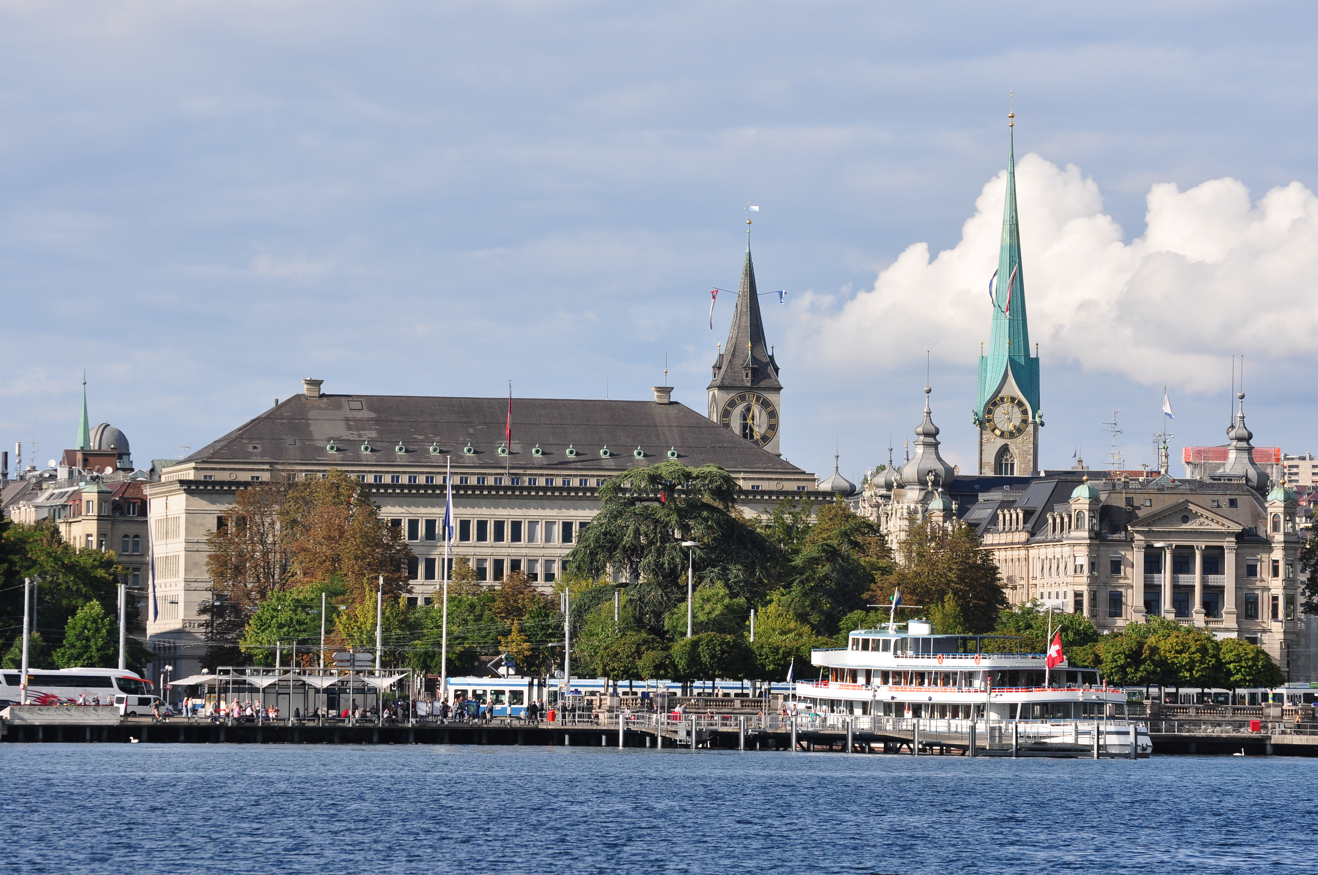 Bürkliplatz in Zürich (Switzerland) : Nationalbank (to the left) and Quaibrücke, Fraumünster and St. Peter church towers in the background, as seen from Zürichsee-Schiffahrtsgesellschaft (ZSG) paddle steamer Stadt Rapperswil.